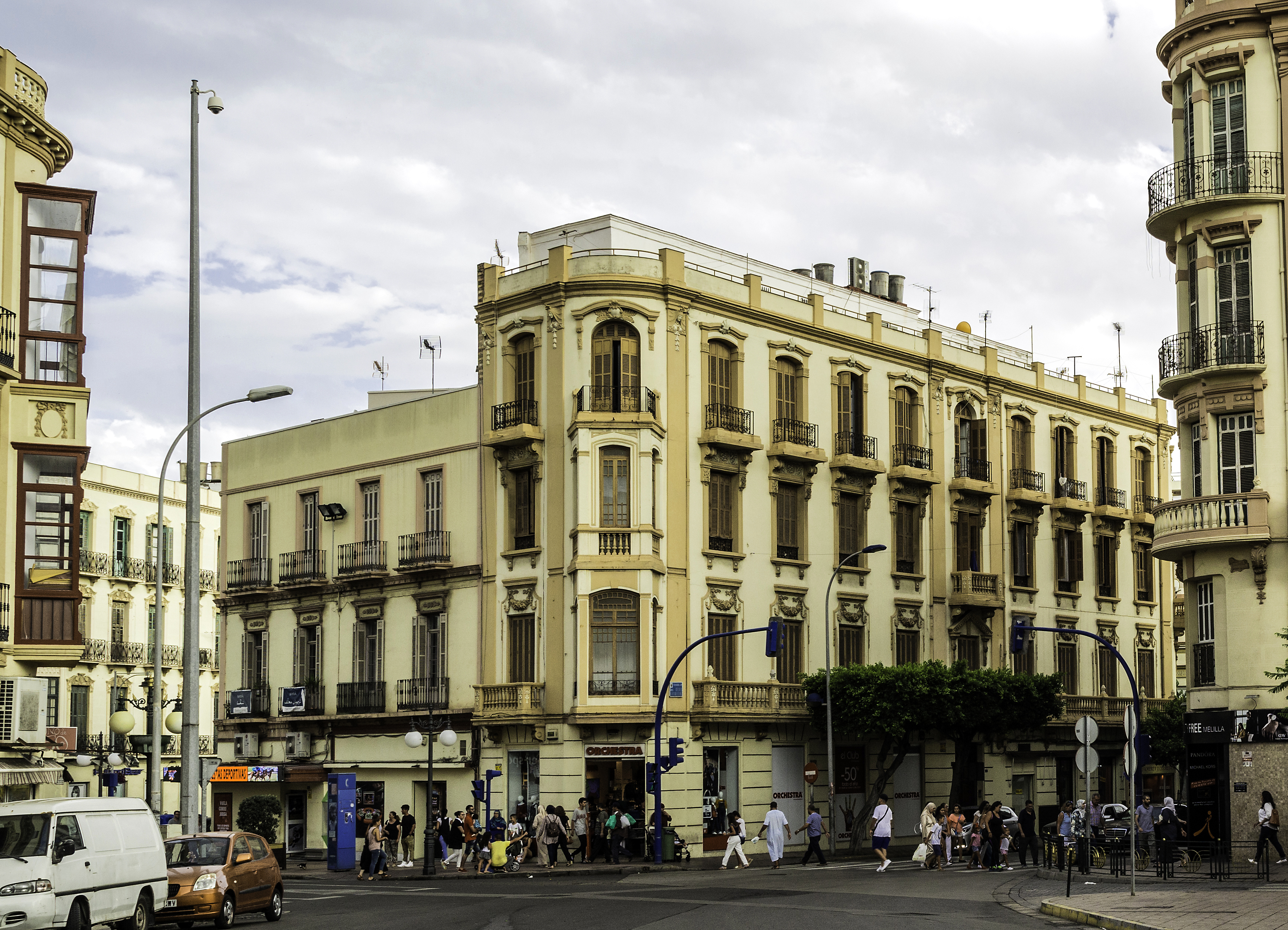 Edificio "La Pilarica". Enrique Nieto (1928). Estilo modernista.